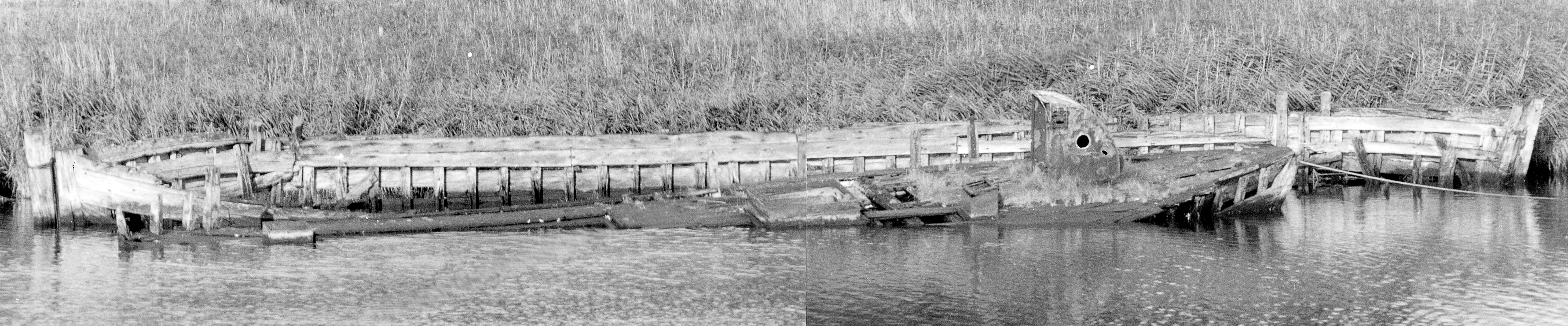 Wrack des Haffkahns ELISABETH von 1926 in Seedorf/Rügen, Bauweise: Stevenkahn, Holz, Wrack nach 1990 beräumt